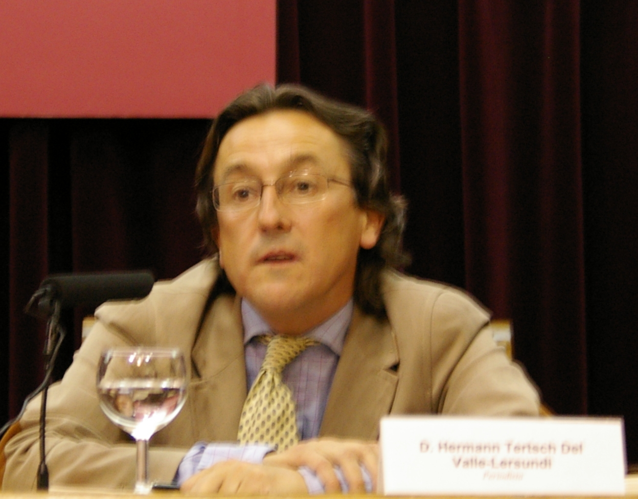 Herman Tertsch en Madrid.